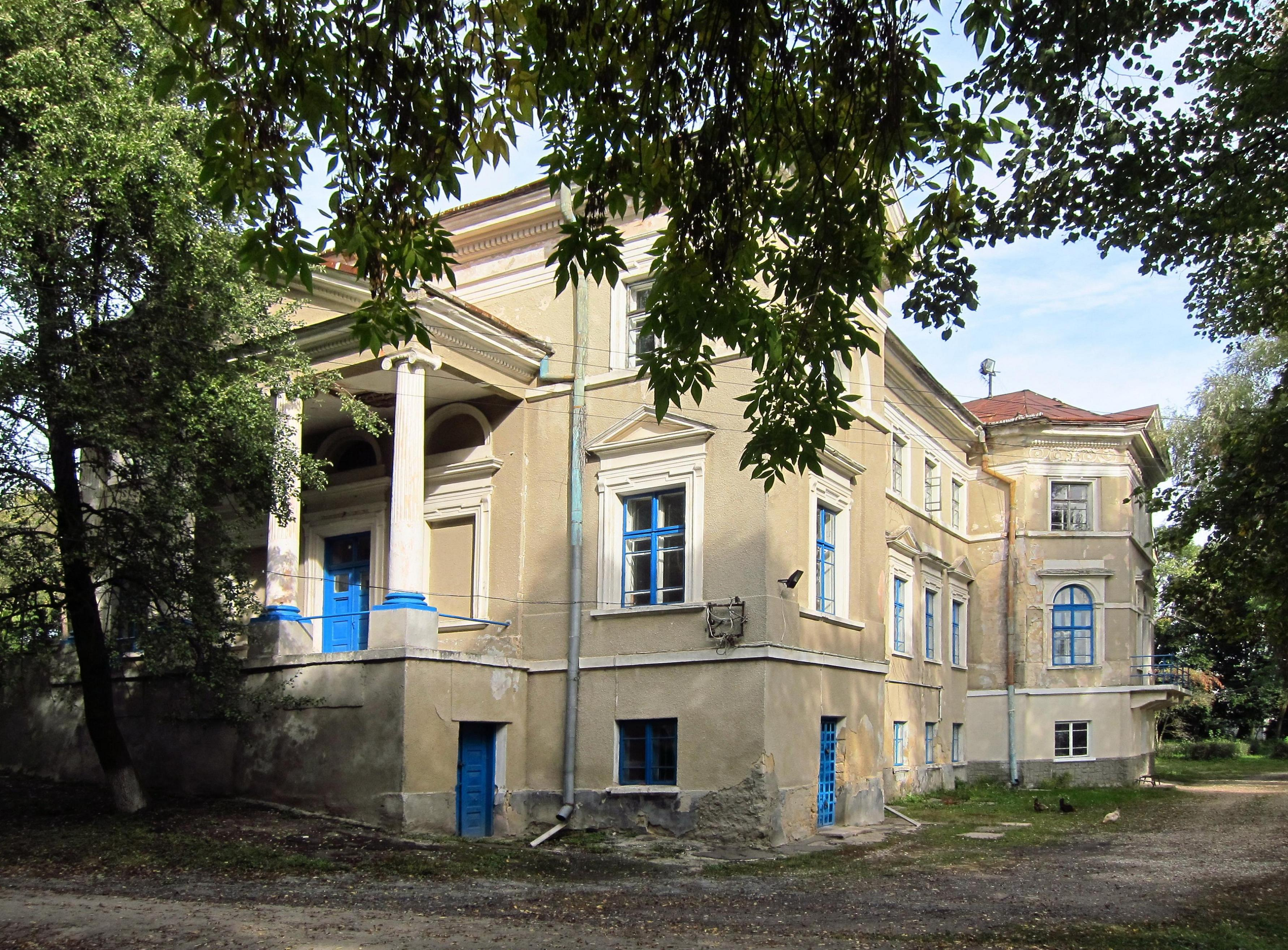 Палац Коритовичів (1720 р.) у Плотичі Тернопільського району Тернопільської області.